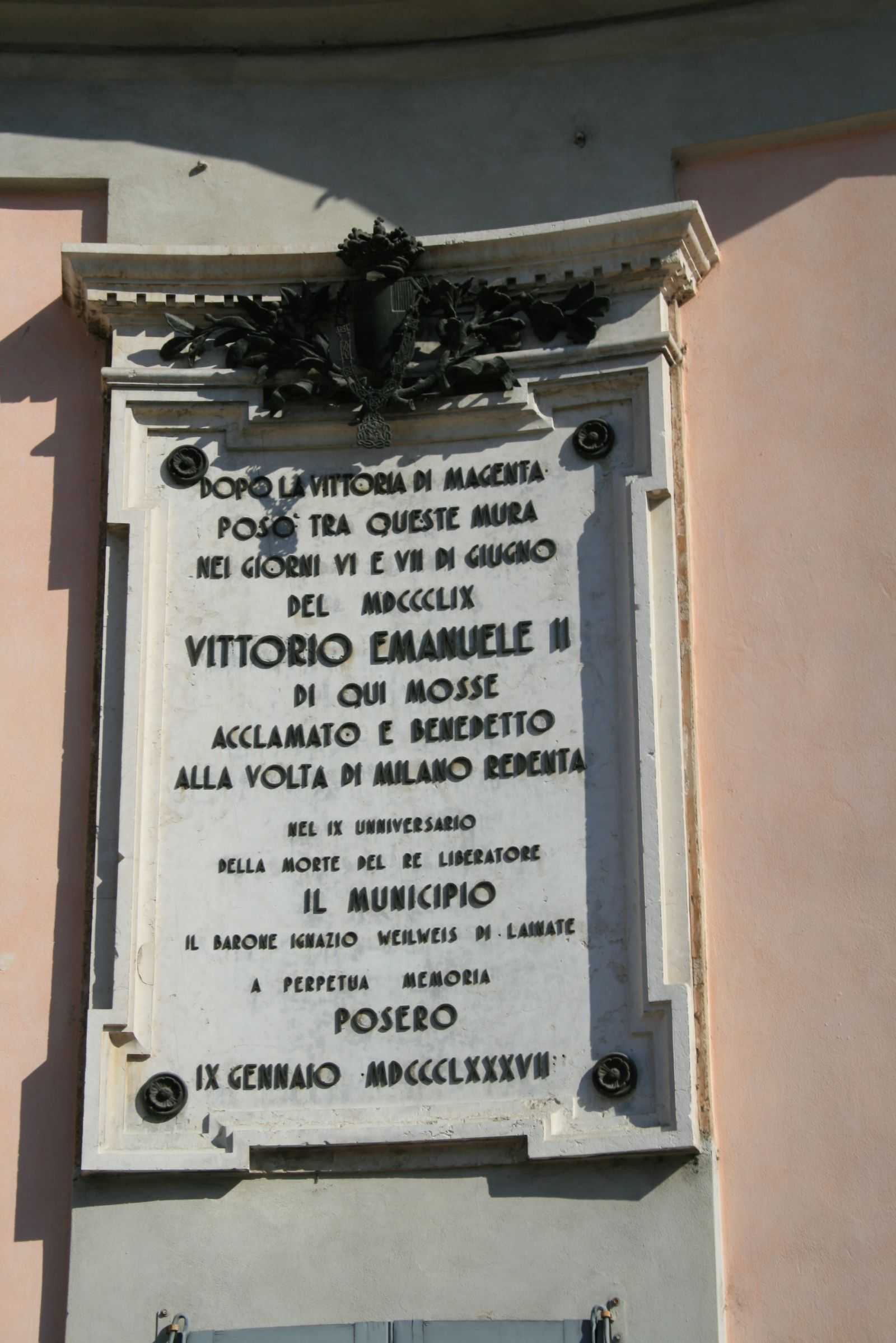 Lainate Vittorio Emanele II Memorial Stone